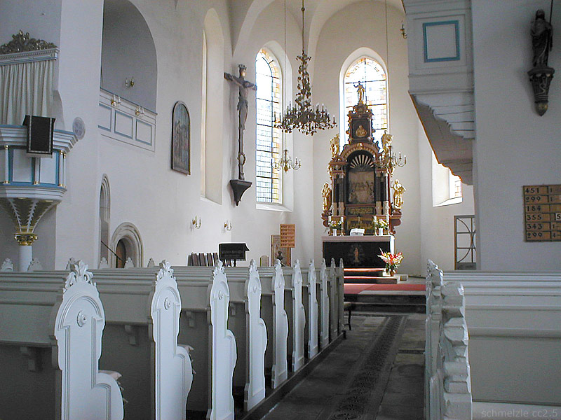 Blick zum Chor der Kirche St. Bartholomäus in Wolkenstein (Erzgebirge)